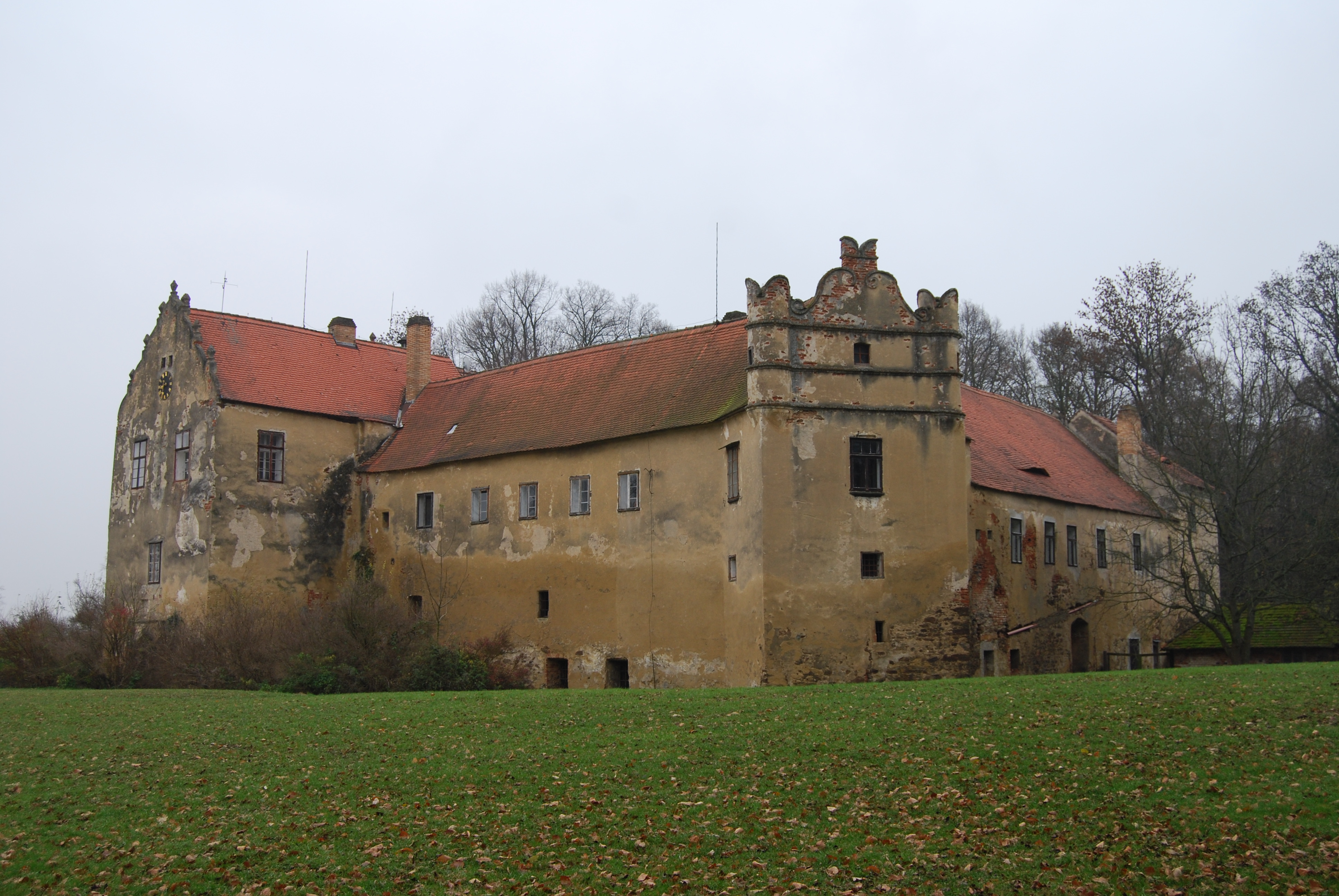 Starý zámek. Libějovice se nachází v okrese Strakonice v Jihočeském kraji. Česká republika. - OpenStreetMap (Info)